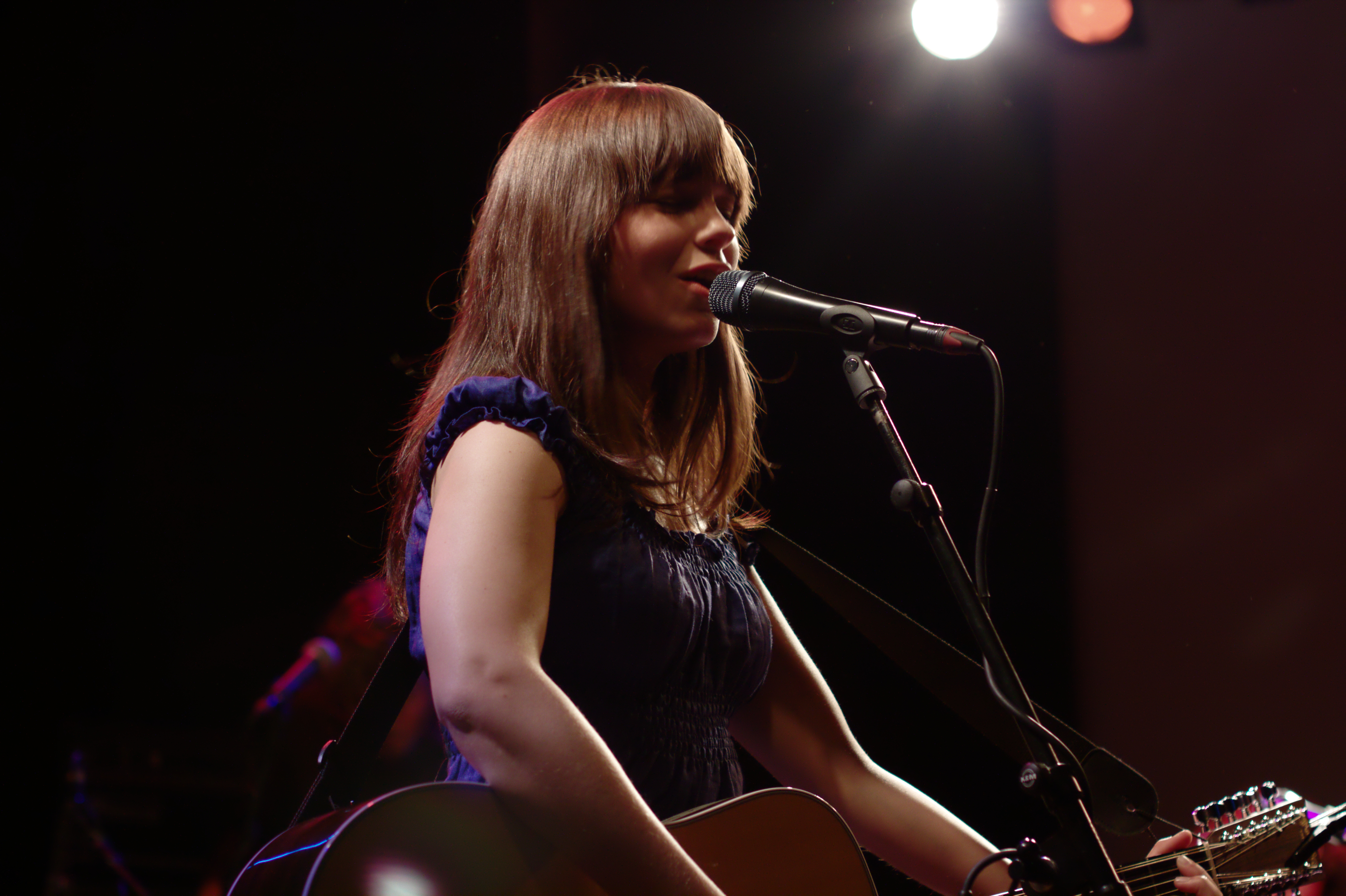 Marit Larsen in Paradiso, Amsterdam, 2009-04-22